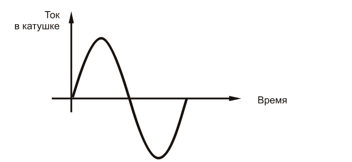 форма бифазного стимула, выдаваемая индуктором магнитного стимулятора